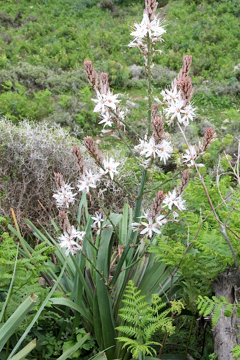 Asphodelus ramosus (det. user:RLJ, see Díaz Lifante, Z. & Valdés, B. 1996: Revisión del género Asphodelus L. (Asphodelaceae) en el Mediterráneo Occidental. - Boissiera 52: 189 pp.)